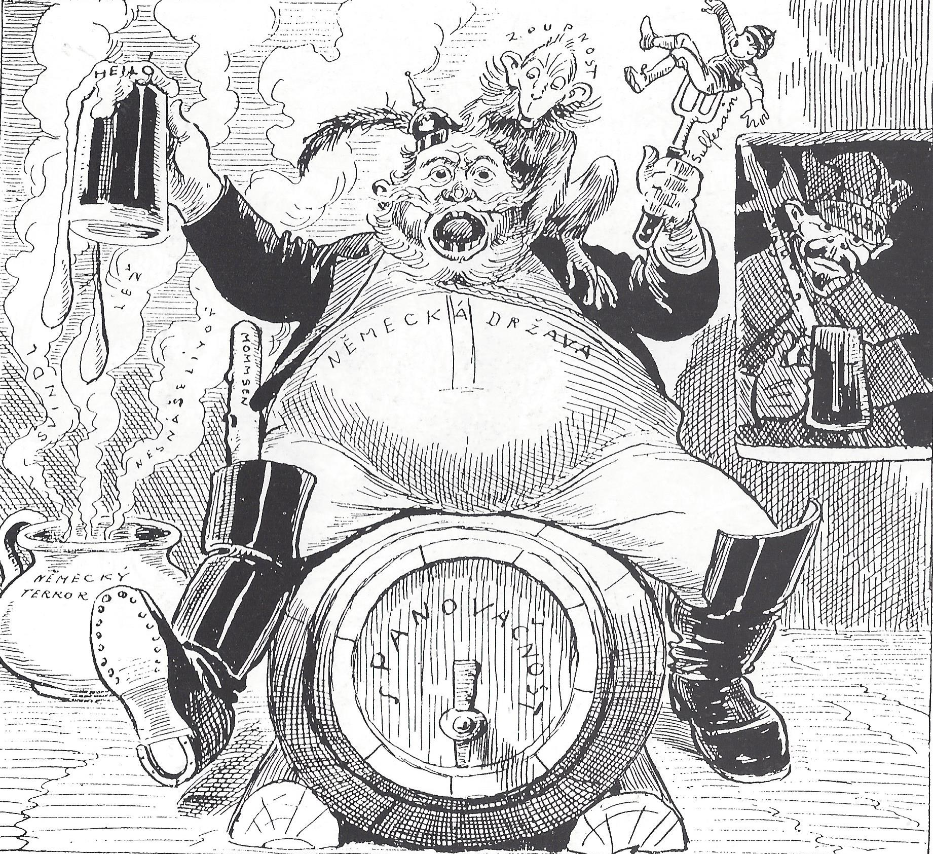 Karikatur auf „Unantastbares deutsches Besitztum in Zisleithanien“, bewacht von einem deutschen Nachtwächter